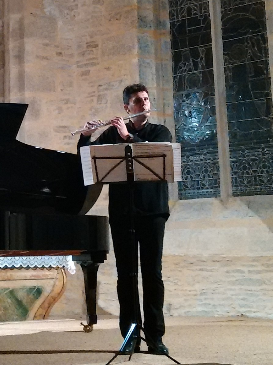 Concert du cycle musical de la chapelle de Kersaint en Landunvez - Vincent Lucas